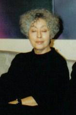 Halszka Wasilewska, dziennikarka.